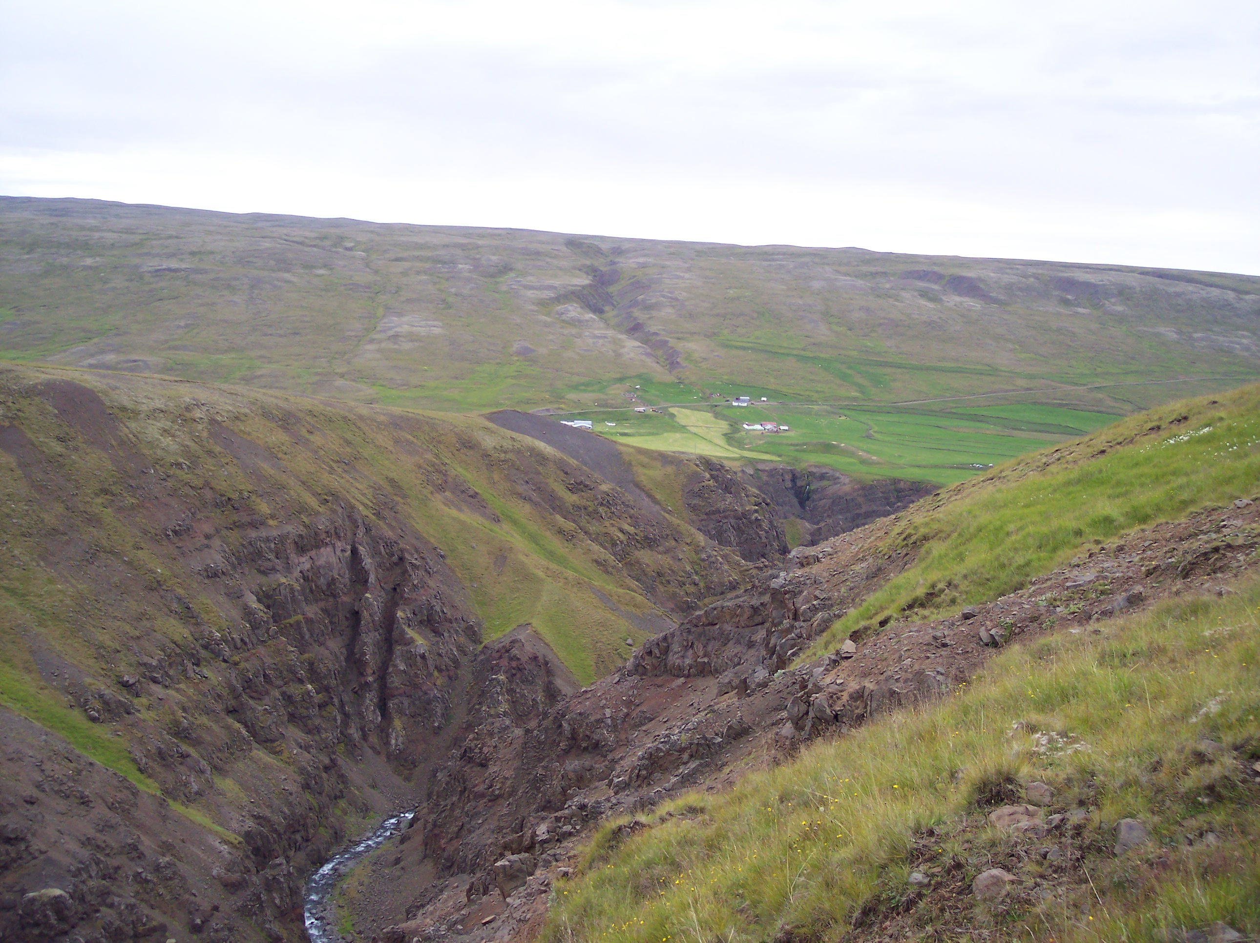 Merkigil, Skagafjörður, Iceland